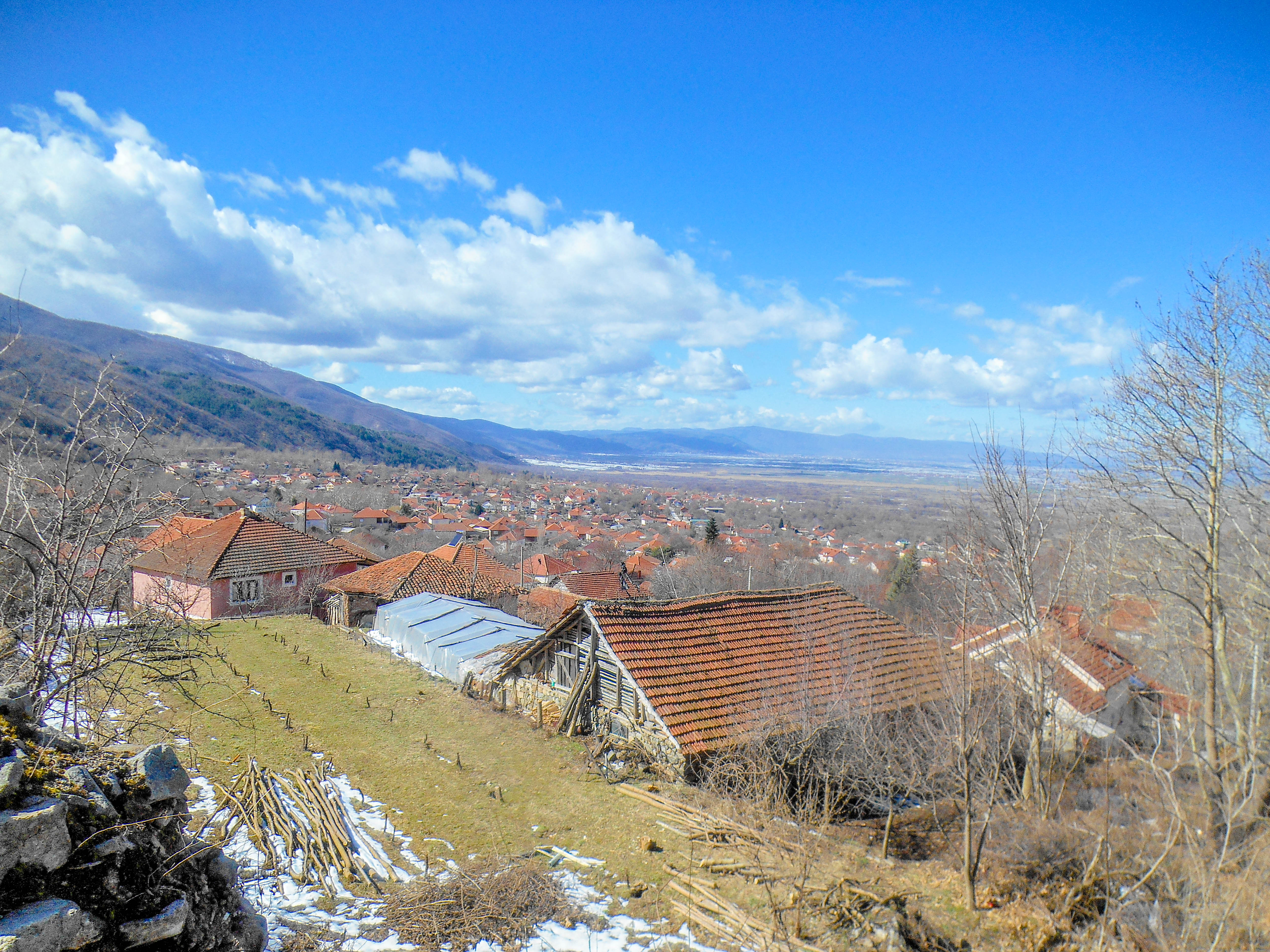 Мокриево